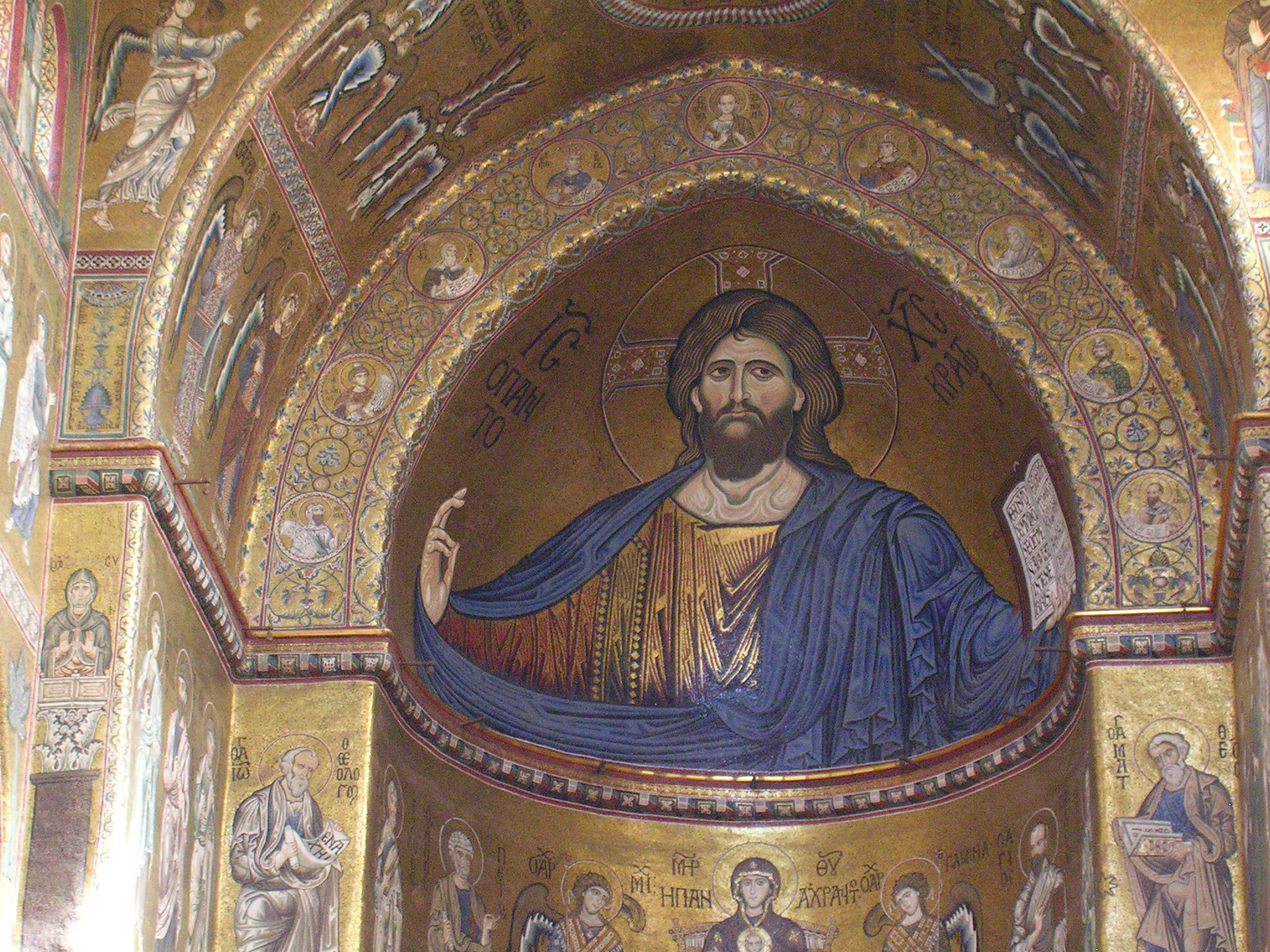 Christ Pantocrator - Cattedrale di Monreale - Sicily - Italy